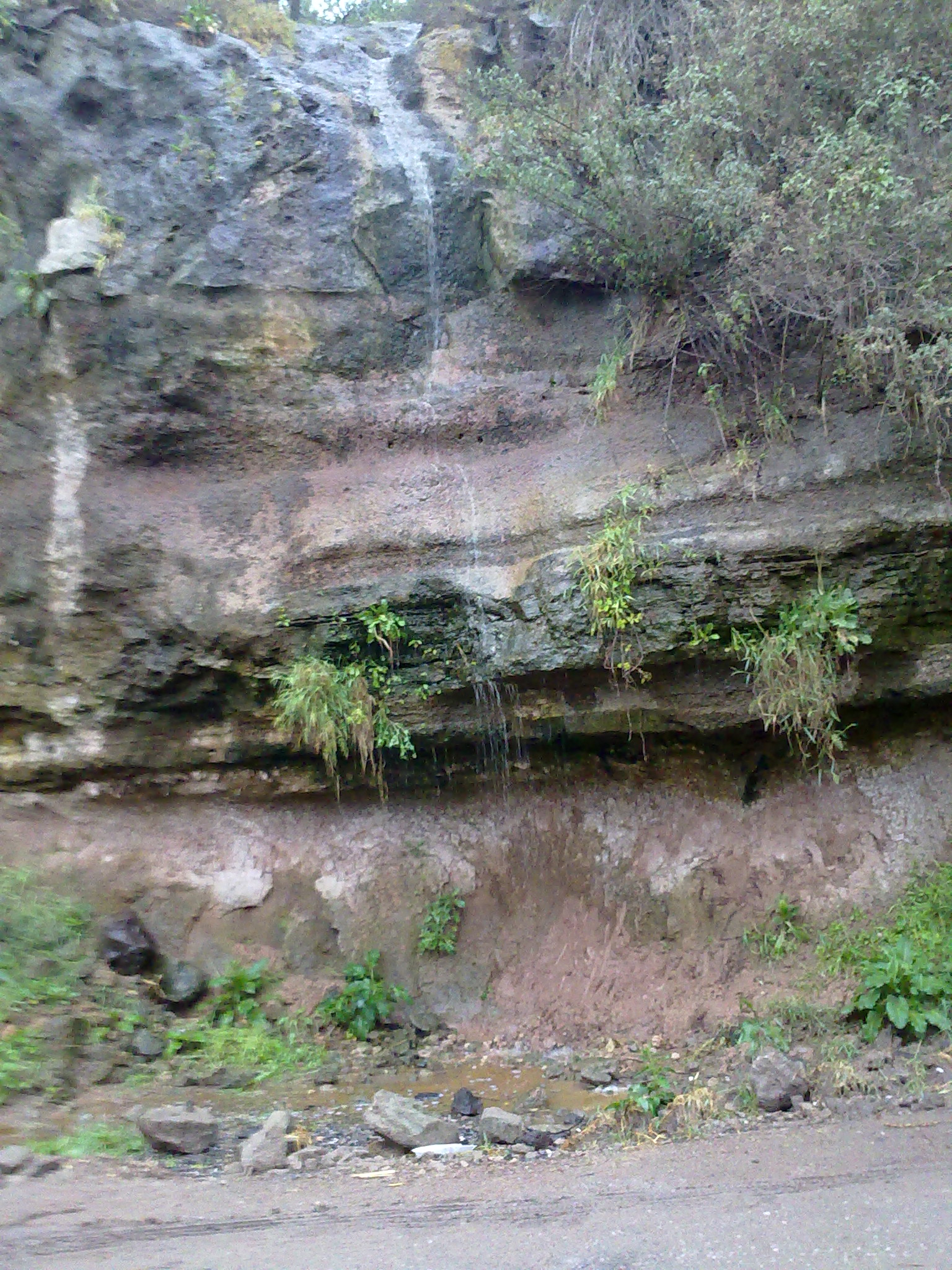 Waterfall